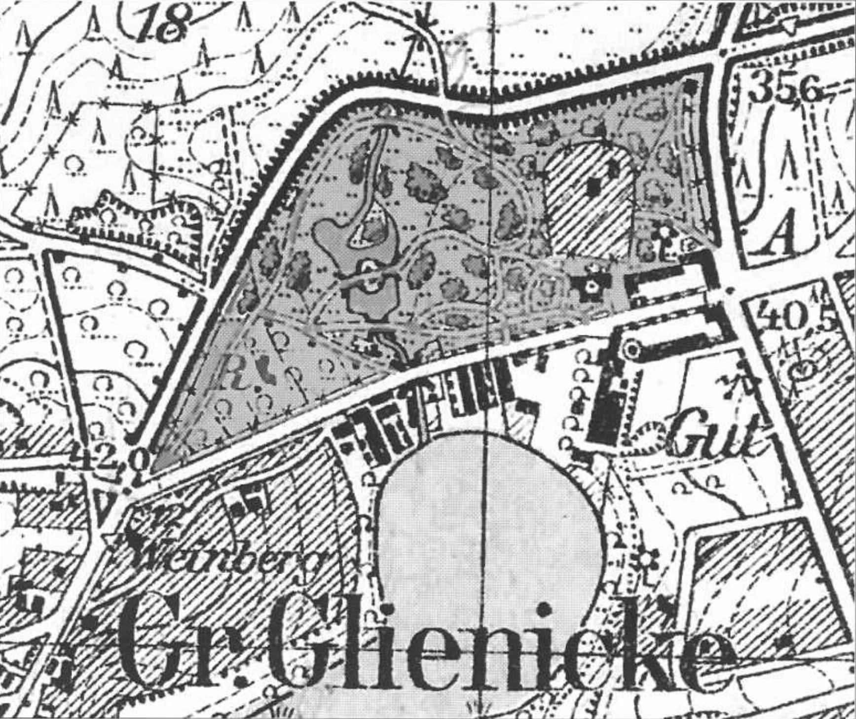 Plan vom Gutspark Groß Glienicke, Ausschnitt aus der Topografischen Karte 1:25.000, Ausgabe 1936